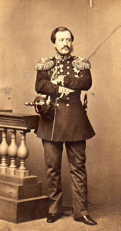 Граф Николай Павлович Игнатьев (17.1.1832—3.7.1908)